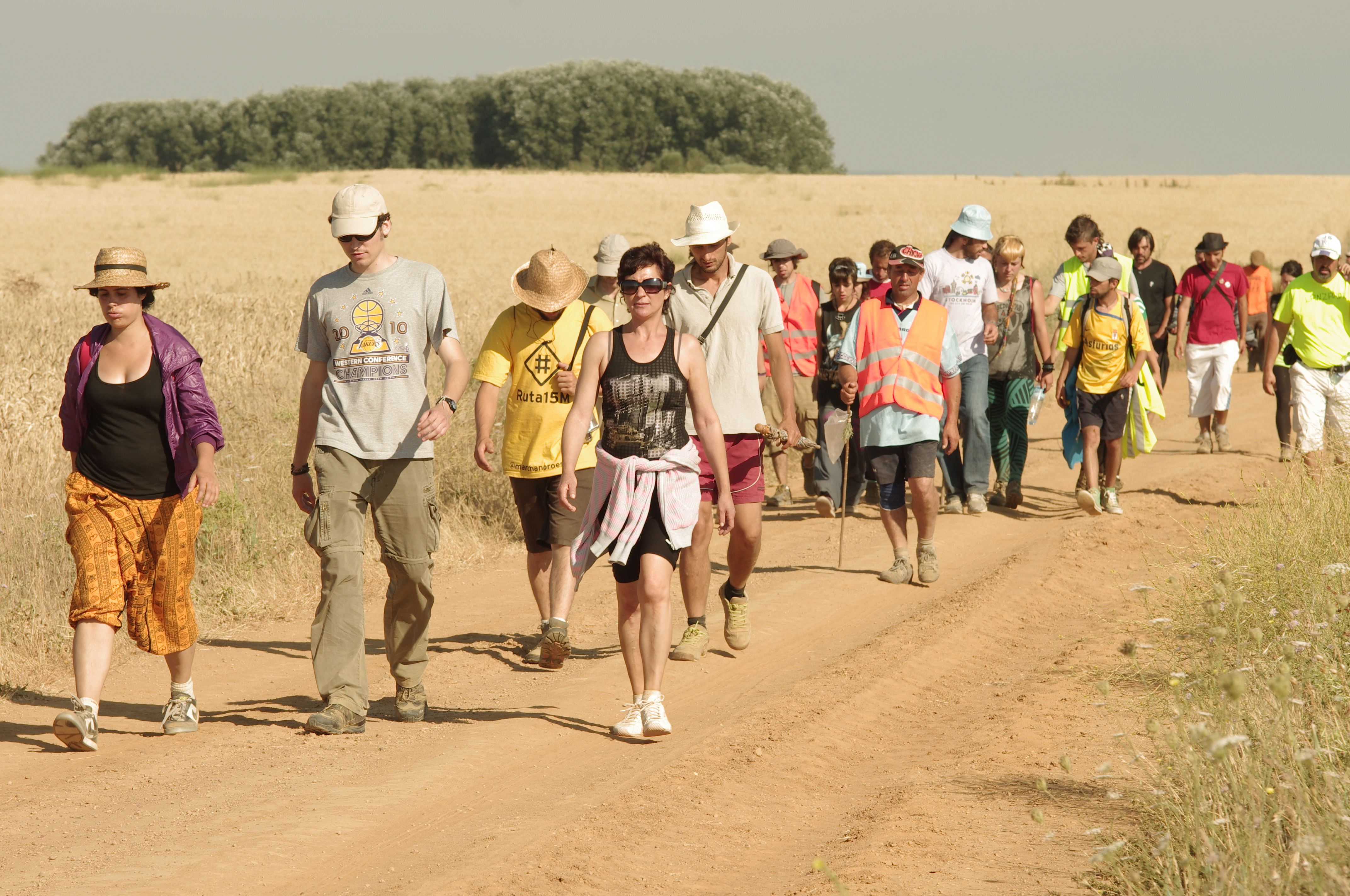 La columna Noroeste caminando hacia Madrid.